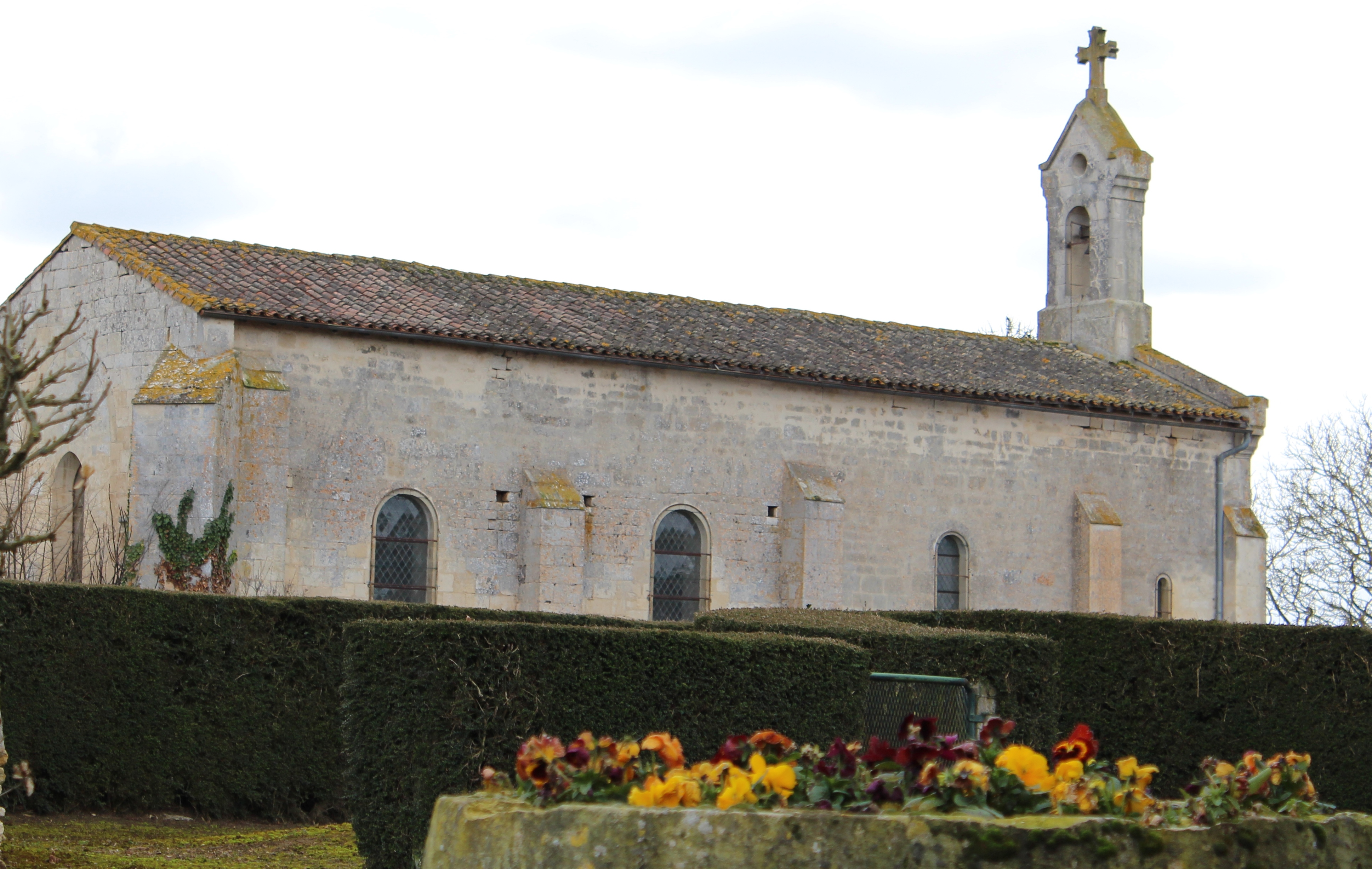 Eglise du village